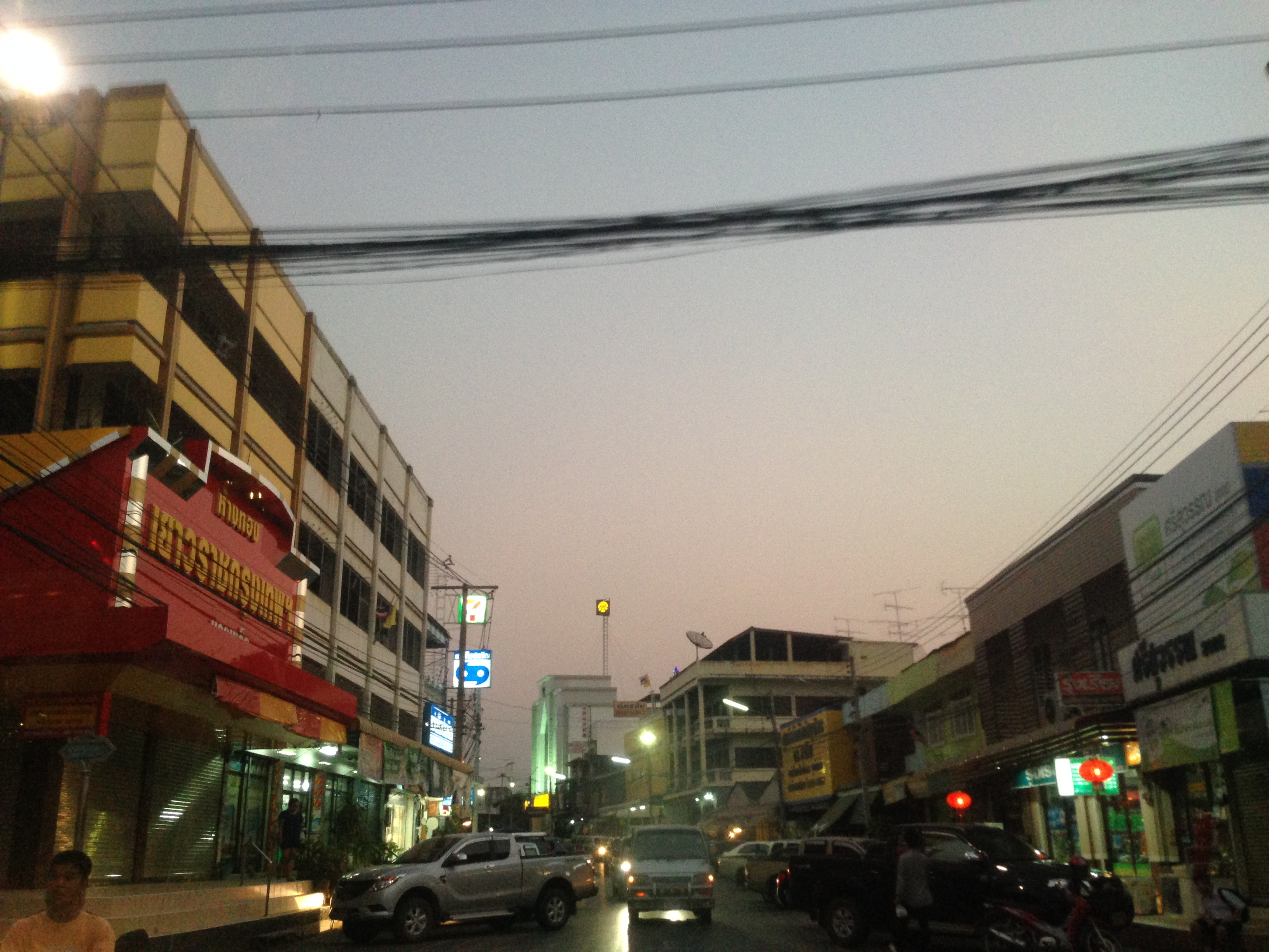 ย่านตลาดมวกเหล็กกับบรรยากาศยามเย็น